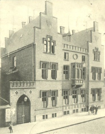 Rathaus der Stadt Kalk auf der Kalker Hauptstraße im Jahre 1901, zerstört im 2. Weltkrieg.